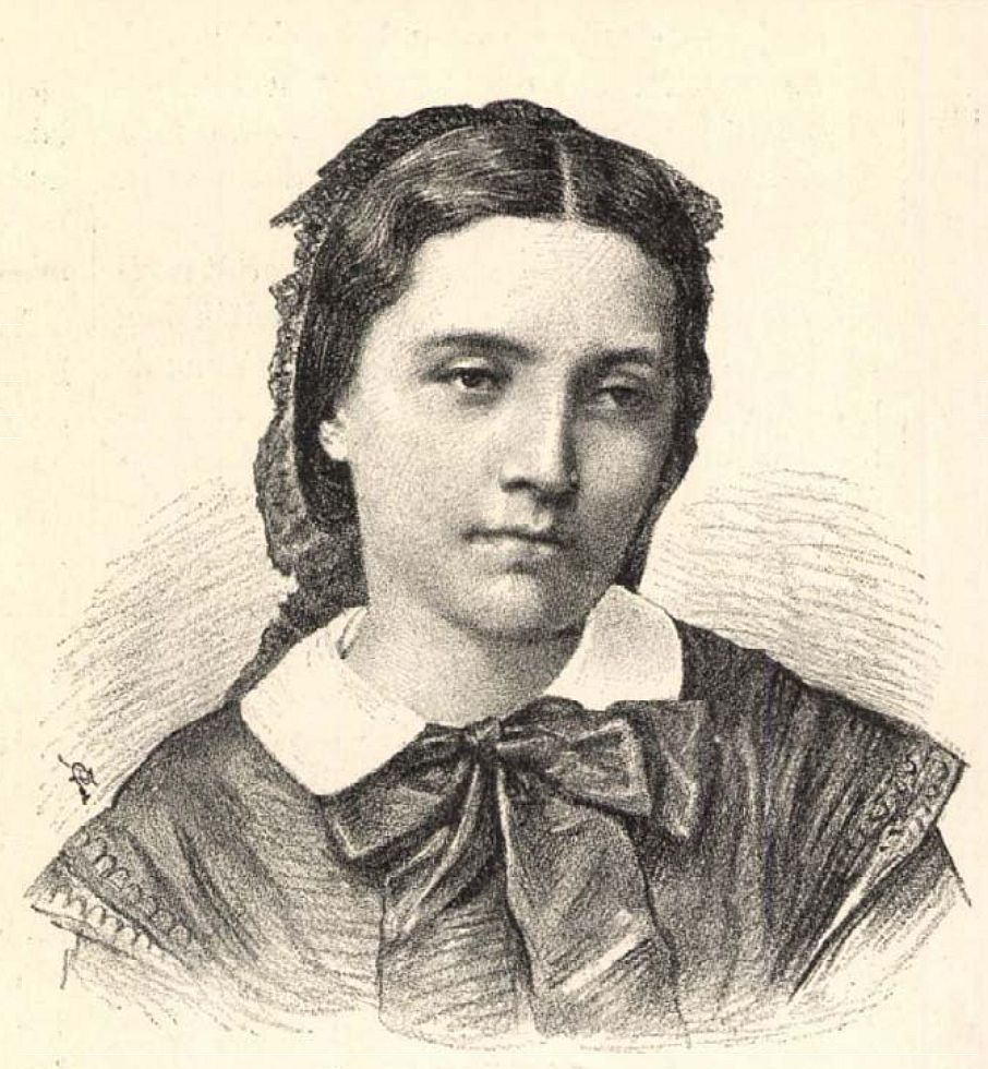 Szendrey Júlia, Petőfi felesége